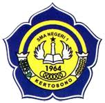 Logo SMA Negeri 1 kertosono